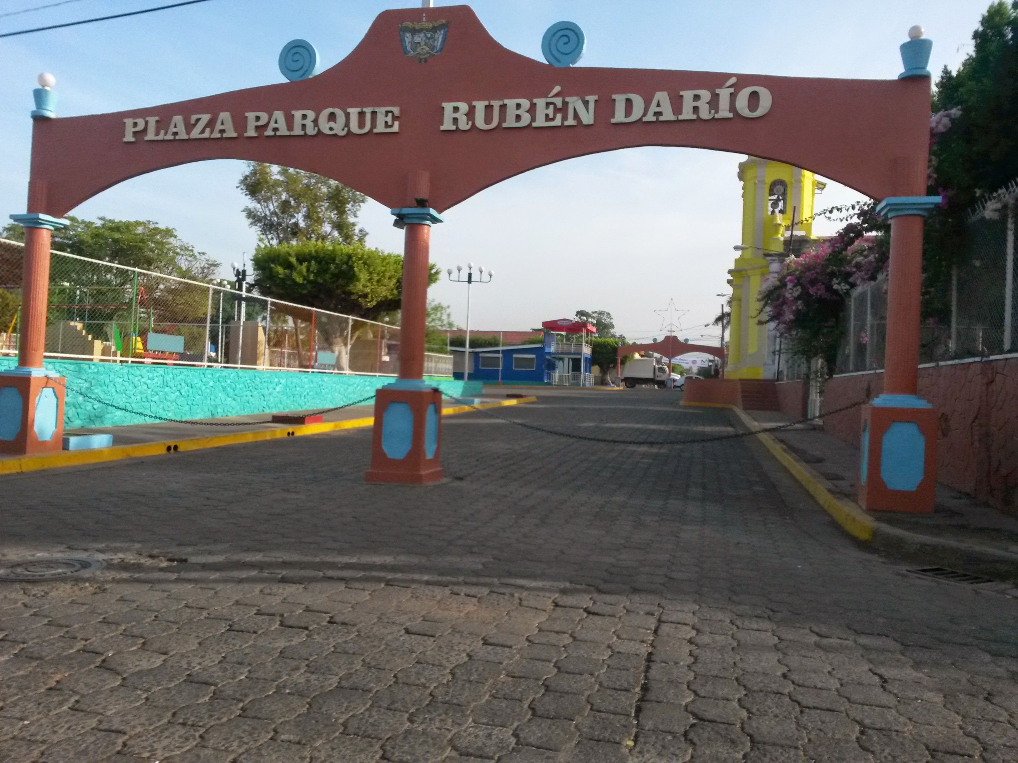 Entra Sur Al Parque De Chichigalpa